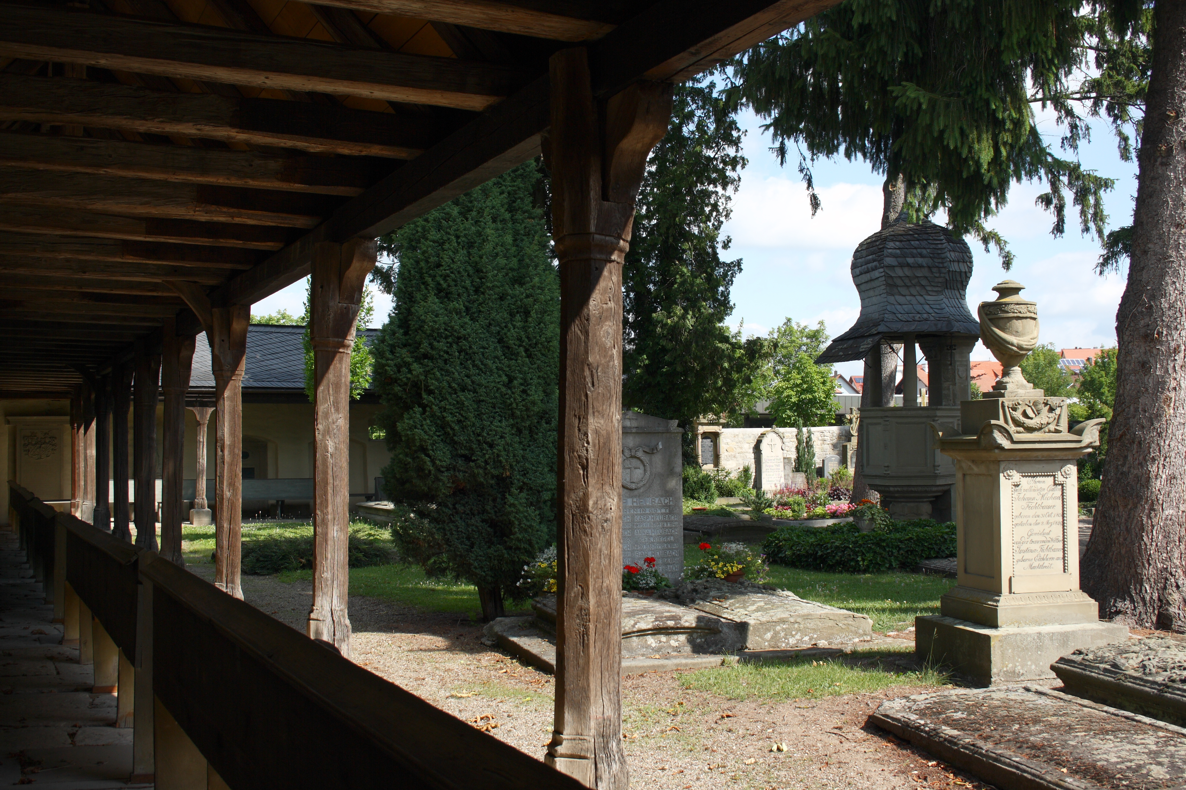 Friedhof von Mainbernheim im Landkreis Kitzingen (Bayern), 1546 angelegt, Arkaden von 1617/18